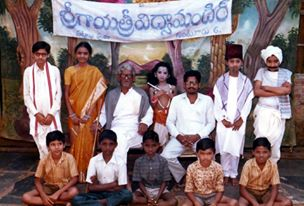 మైత్రి నాటిక స‌మాజ స‌భ్యుల‌తో విద్యాధ‌ర్ మునిప‌ల్లె చ‌ర్మ‌కారుని పాత్ర‌లో....